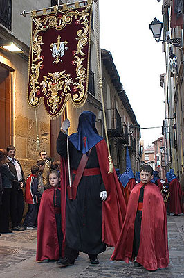 Cofradía de las Santas Caídas de Jesús en su Via Crucis de Jueves Santo en Soria.